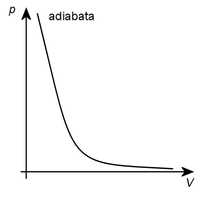 adiabatická krivka